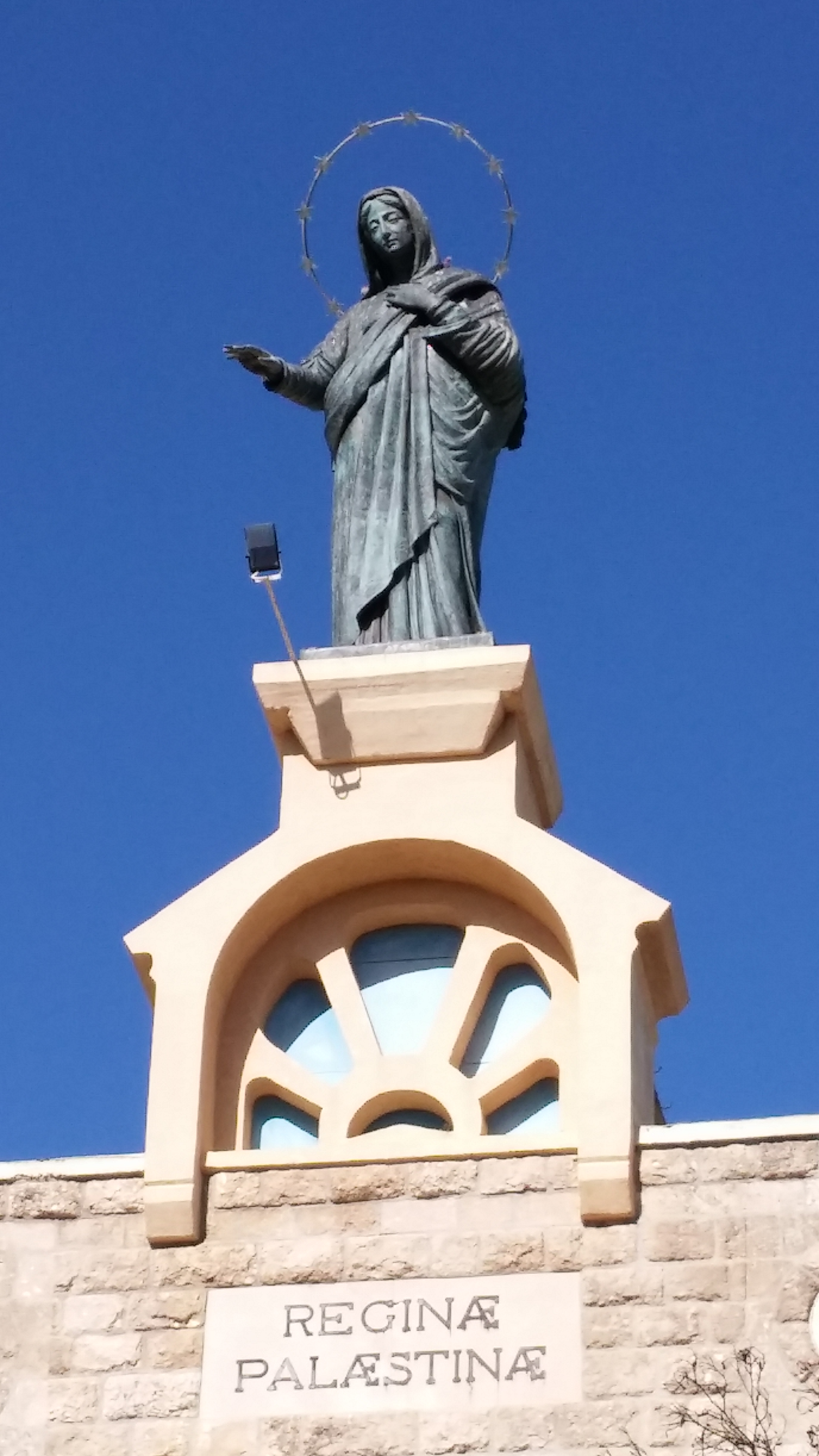 מנזר דיר ראפאת 07